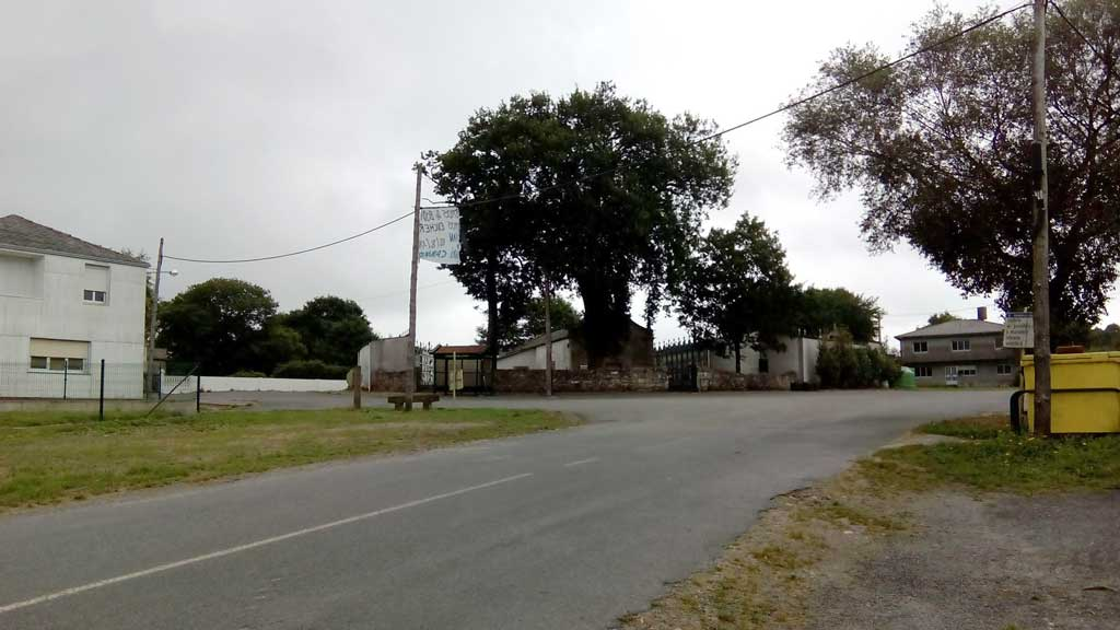 Vista de Paradela, Curtis.